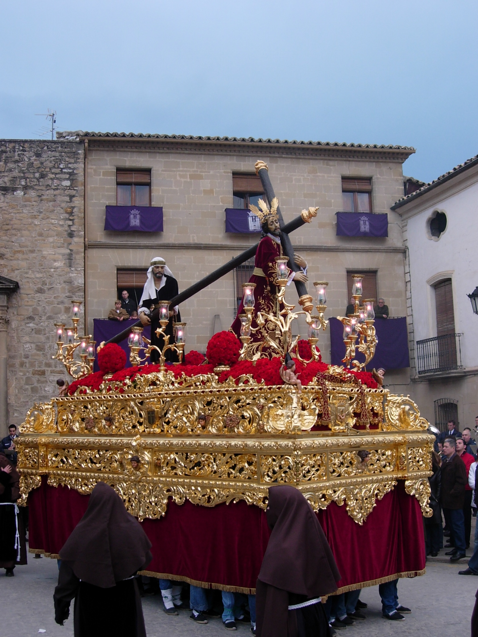 La Veracruz por la Puerta de Úbeda por Juampa Mola